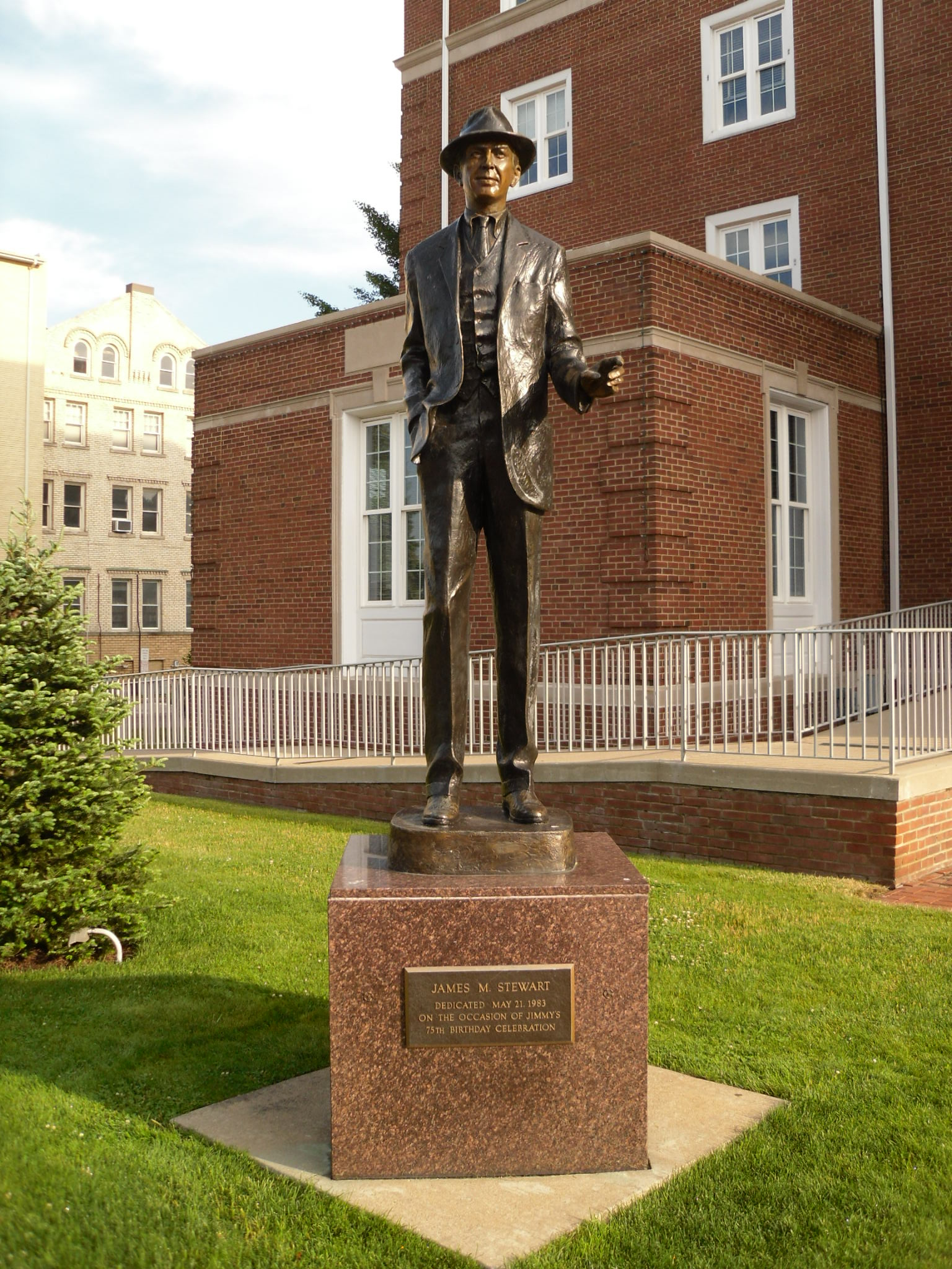 Indiana, Pennsylvania